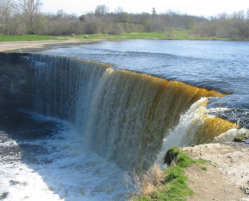 Jägala juga.